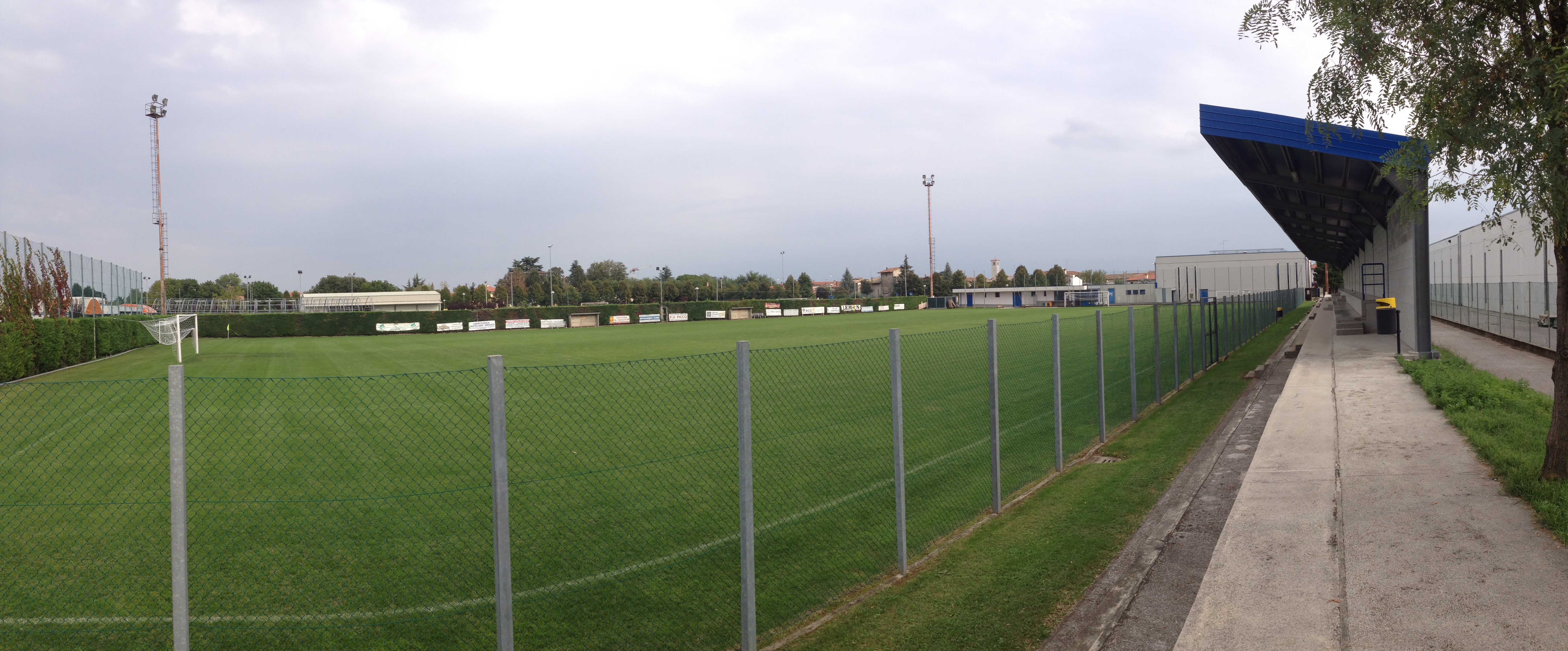 Foto di F. Curridor. Campo sportivo di Flaibano.